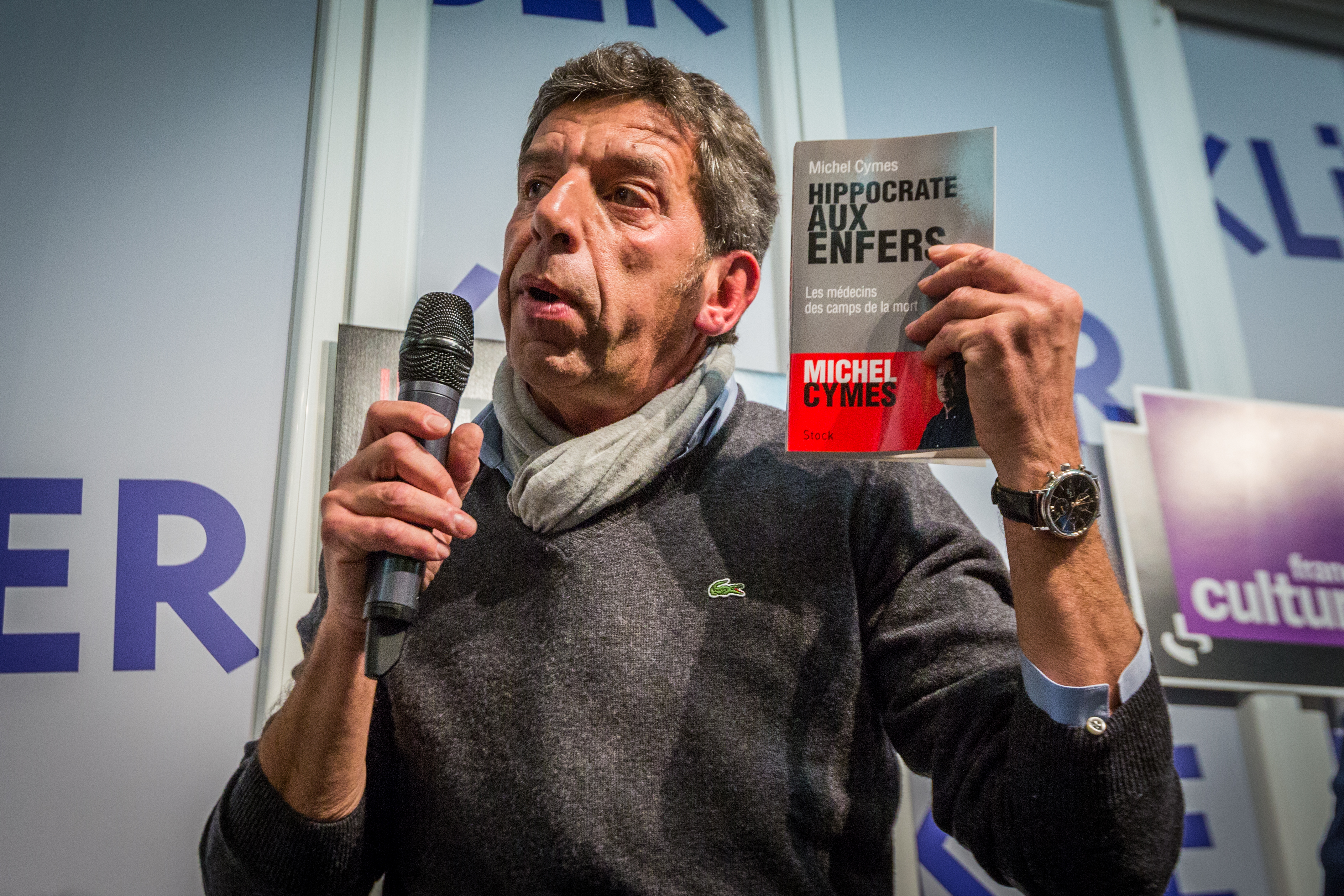 Michel Cymes à la librairie Kléber Strasbourg 30 janvier 2015